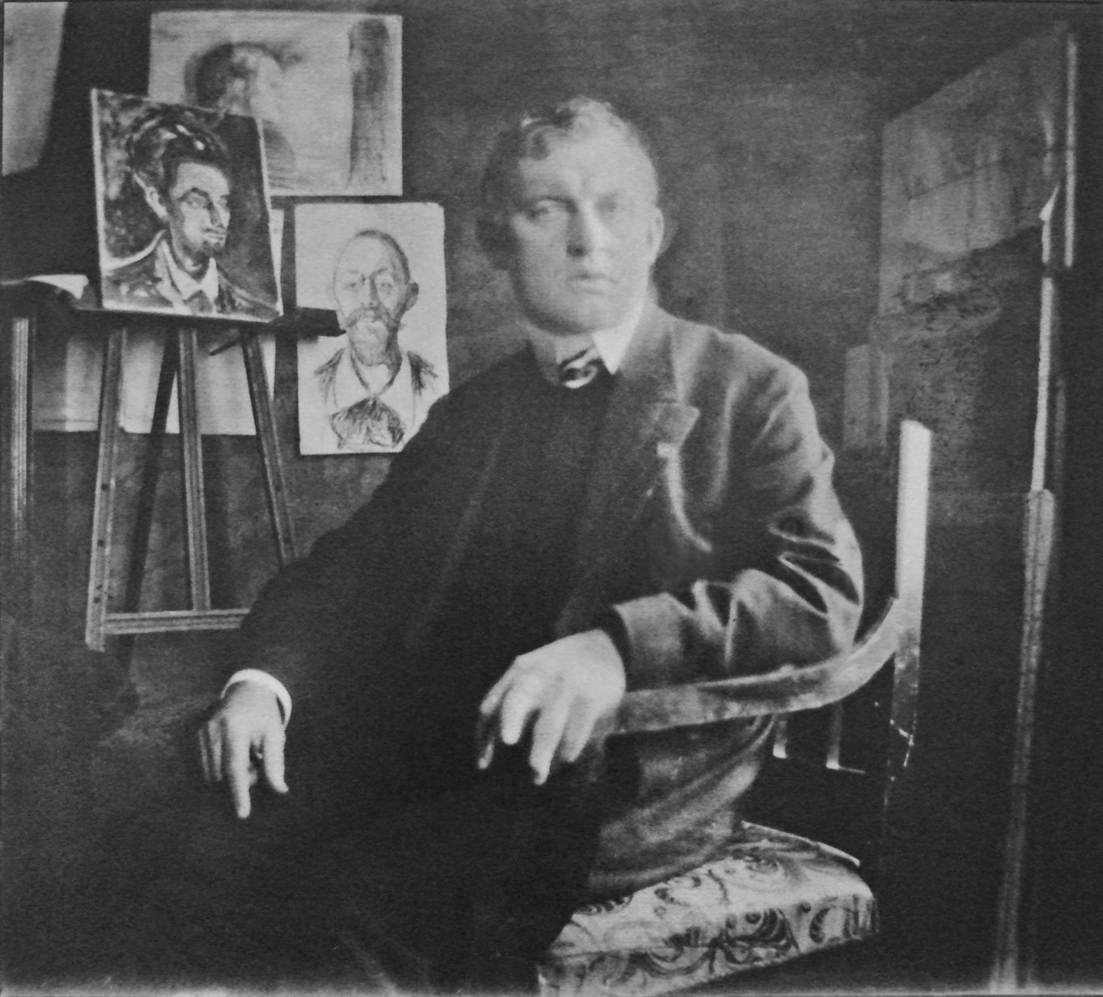 Photographie d'Edvard Munch 1908-1909 musée Munch Munch Museum photo archive. Photo exposée rephotographiée dans le musée Photo Annie Dalbéra